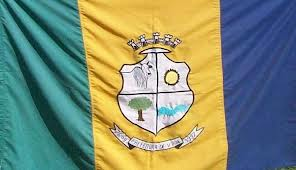 Bandeira da cidade de Vila Boa - Goiás